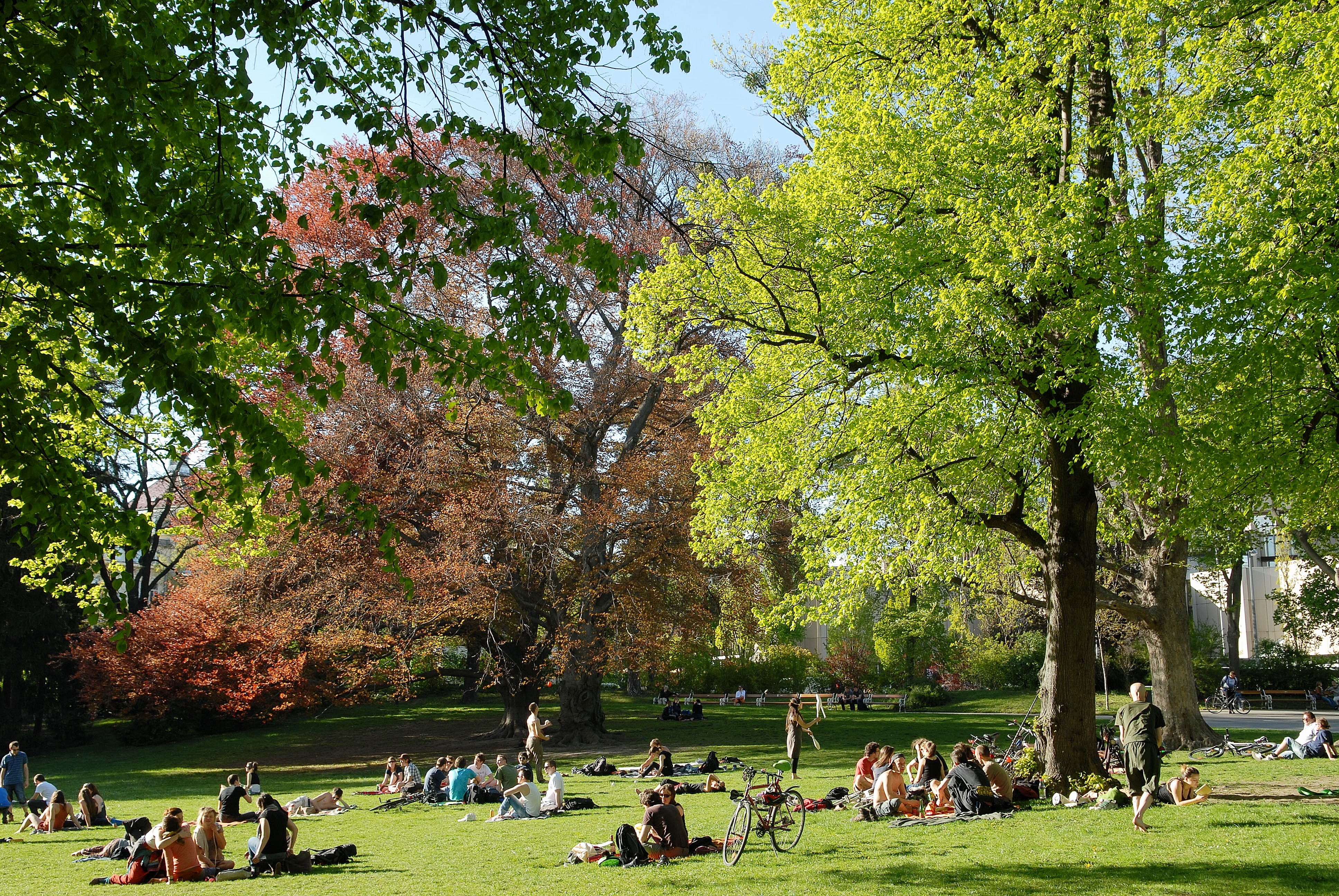 Türkenschanzpark, Wiese, 2012